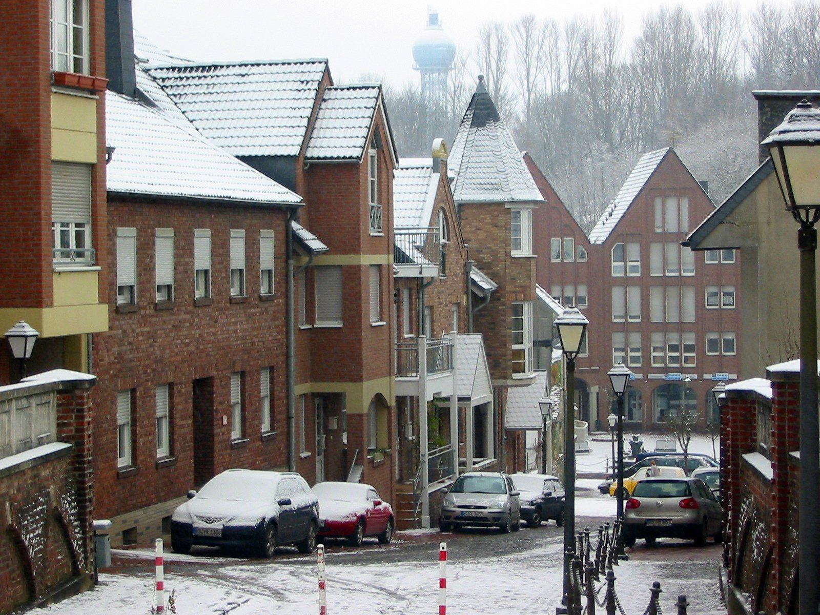 Blick von der Übacher Kirche Richtung Wasserturm